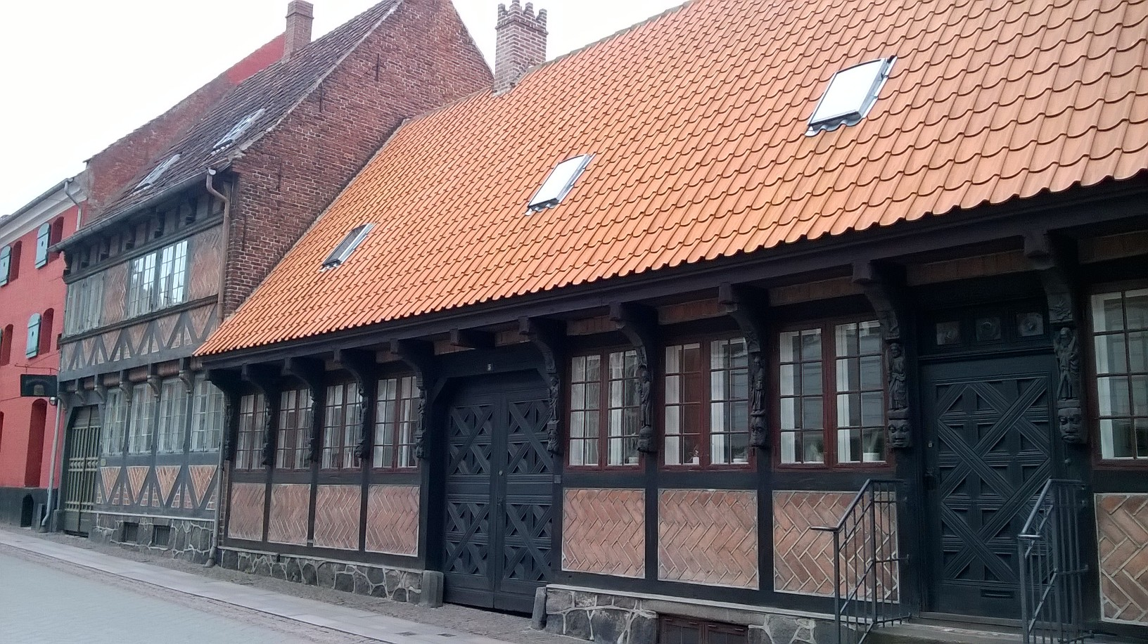 Apostelhuset og Ridderhuset i Riddergade, Næstved.